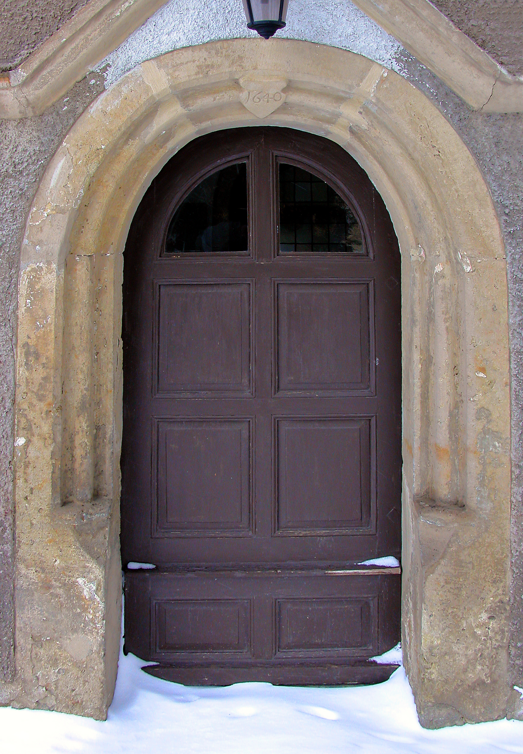 30.01.2010 01734 Rabenau: Evangelische St. Egidien Kirche (GMP: 50.962942,13.641054) am Markt. Einschiffiger Renaissancebau (1642). Südportal. [DSCN40378.TIF]20100130055DR.JPG(c)Blobelt